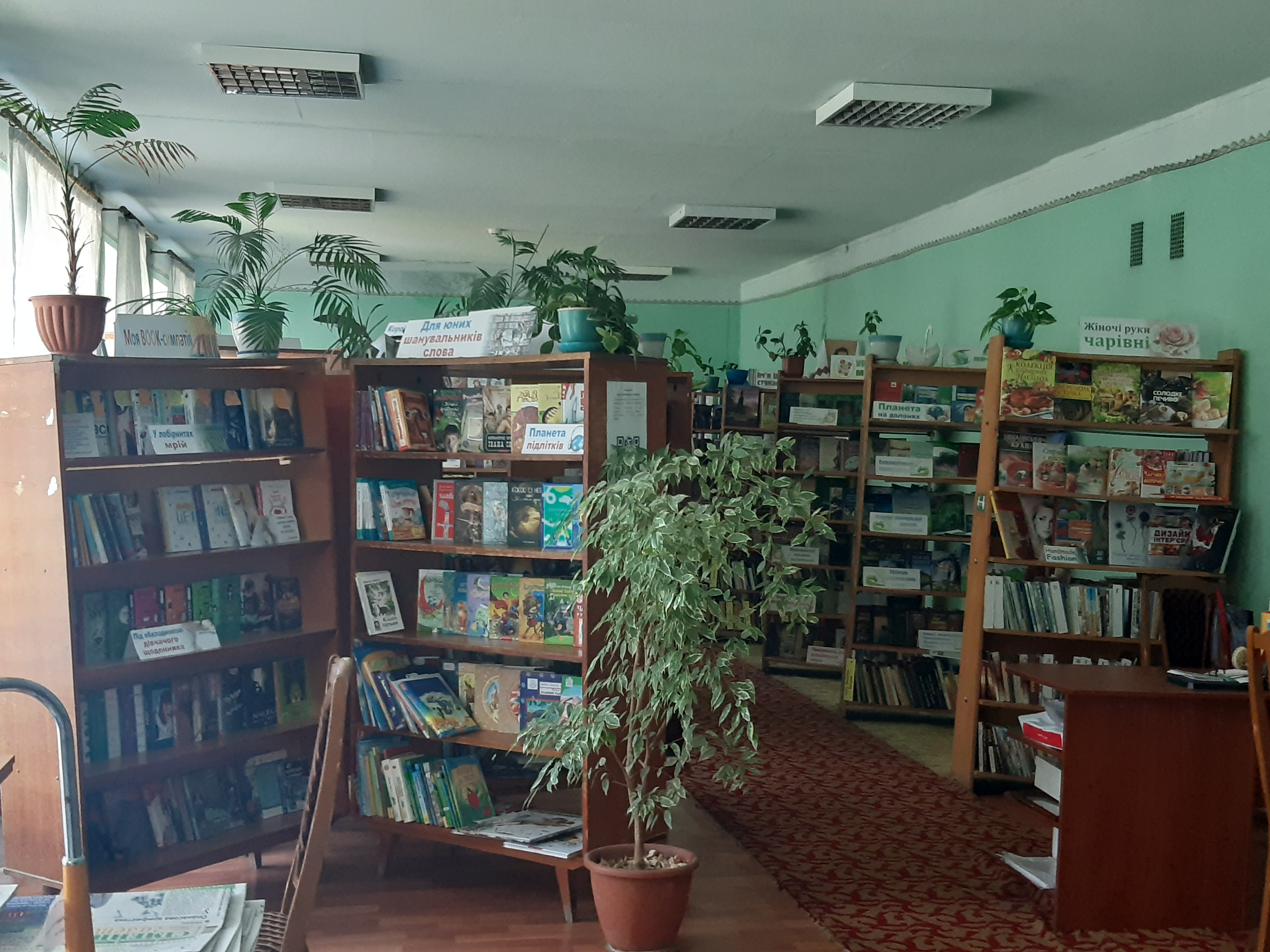 Абонемент Хмельницької міської бібліотеки-філії №11, який представлений великою кількістю різноманітної художньої та довідкової літератури .